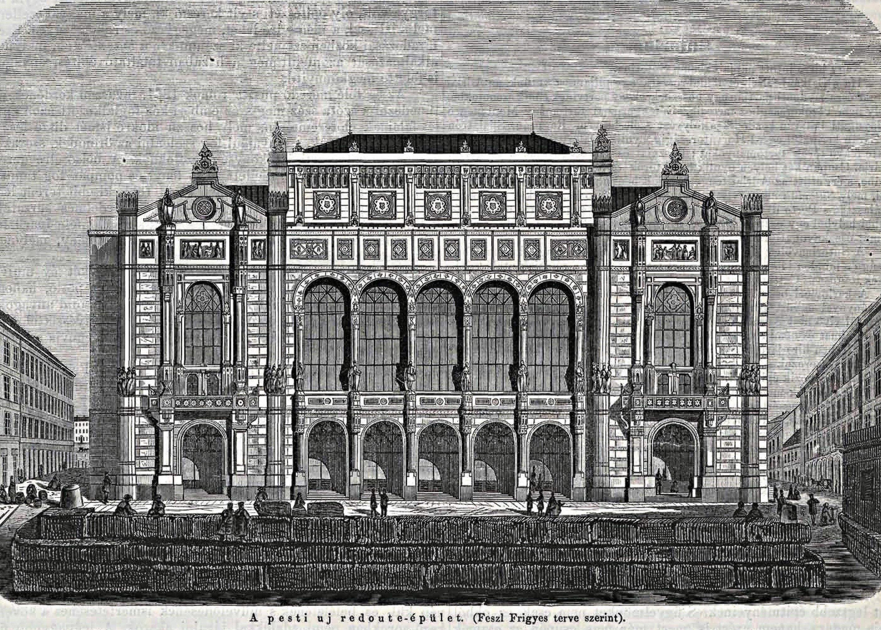 A pesti uj redoute-épület , Vasárnapi Ujság illusztrációja, 1862.